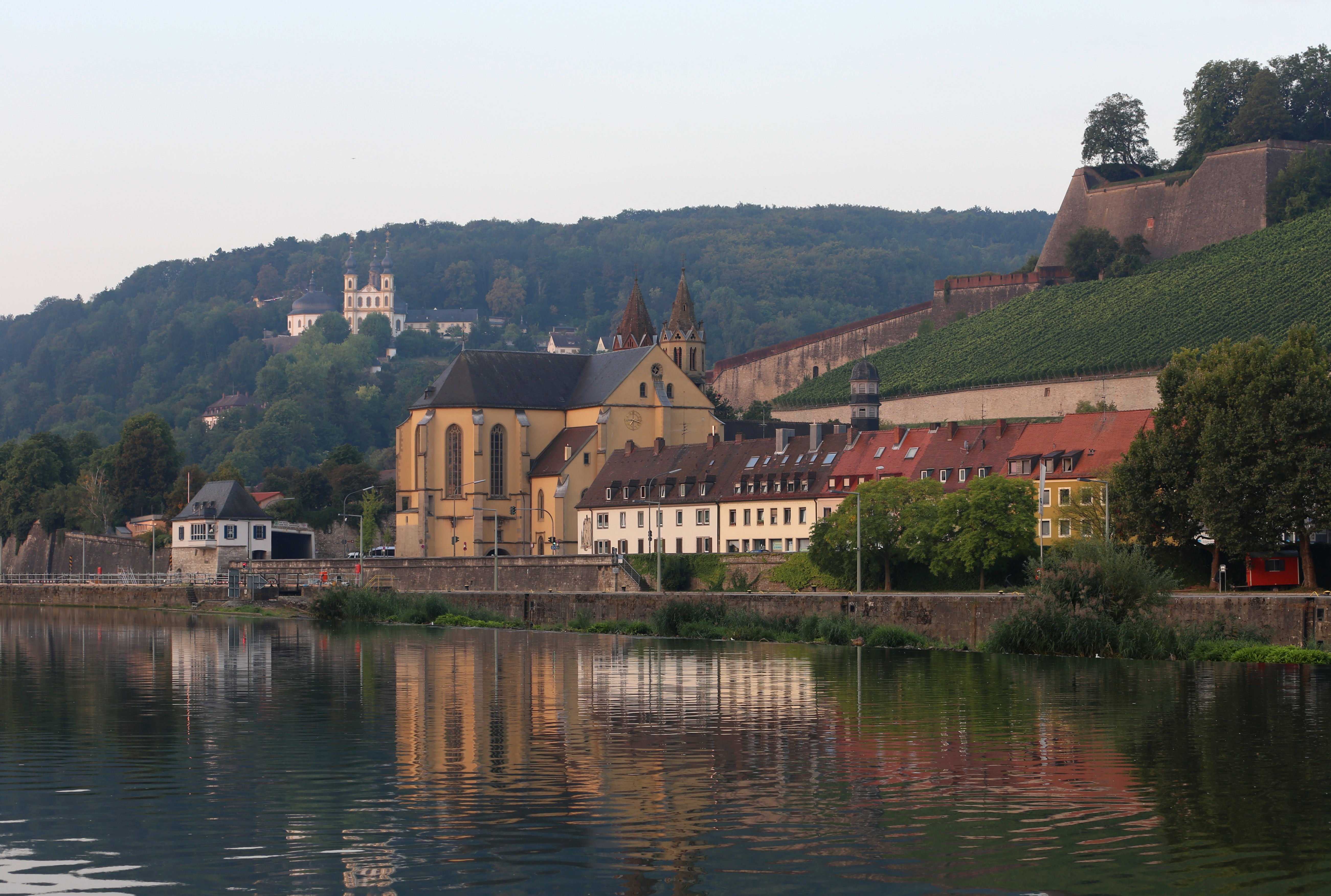 Burkarderstraße 42, Würzburg; Katholische Pfarrkirche St. Burkard, dreischiffige Basilika mit erhöht über einer Straßendurchfahrt liegendem 5/8-Chor und breitem Querschiff, Sattel- und Pultdächer, in den Zwickeln zwischen Langhaus und Querschiff ursprüngliche Chorflankentürme mit achteckigen Obergeschossen und steinernen Turmhelmen, Langhaus mit haubenbedecktem Giebelreiter über Konsole, auf der Nordseite offene Vorhalle mit Rundbögen und Walmdach, Putzmauerwerk mit Sandsteingliederungen diverser Epochen, Kernbau mit Langhaus und Türmen romanisch, 11.–13. Jahrhundert, Vorhalle um 1170, Chor und Querschiff spätgotisch, 15.–17. Jahrhundert, Straßendurchfahrt bezeichnet „1491“, historisierende Erneuerung 1857/58 und 1894, Wiederherstellung nach Teilzerstörung 1948; mit Ausstattung